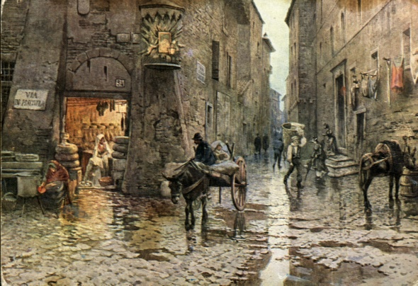 Palazzo Mattei alla Lungaretta in Rome (rione Trastevere)